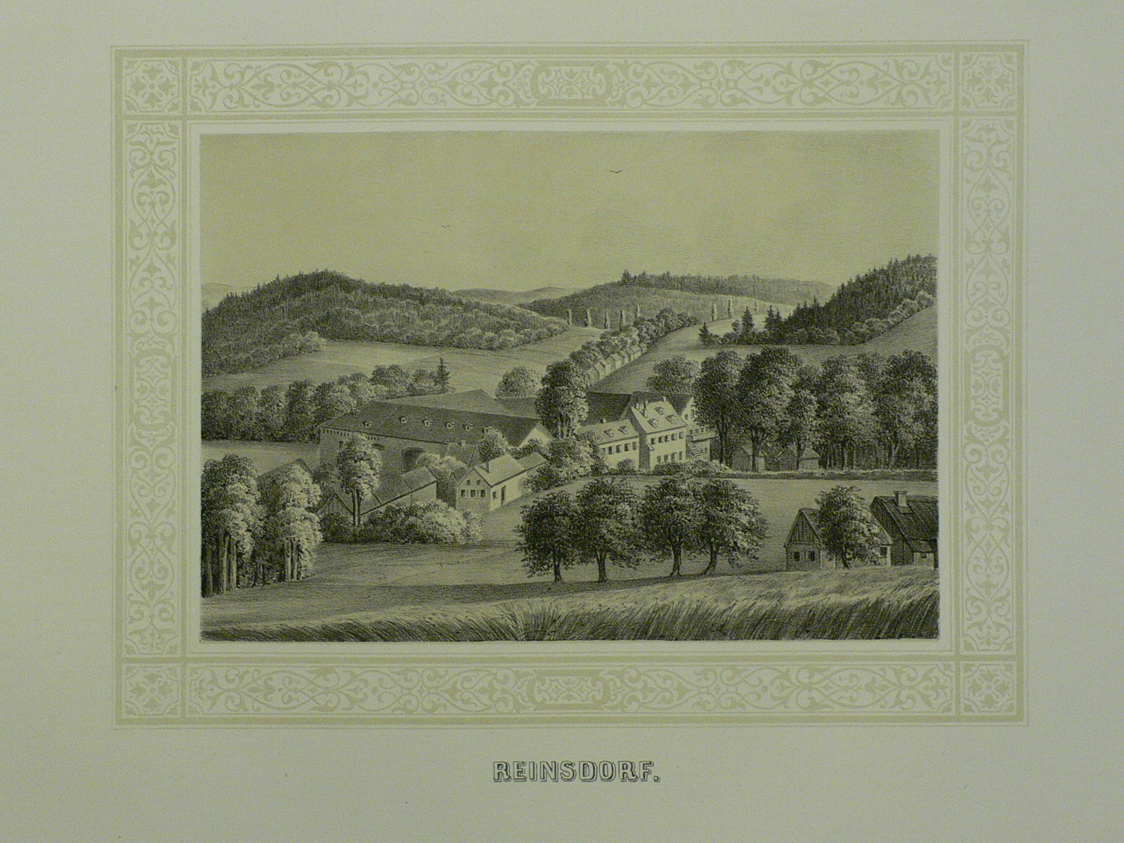 Rittergut Reinsdorf (Heute Stadtteil von Plauen). Tonlithografie, 1854-1860. 13,5 x 19,6 cm . Aus: Gustav Adolph Poenicke, Album der Schlösser und Rittergüter im Königreiche Sachsen ... (Leipzig: Expedition des Albums Sächsischer Rittergüter und Schlösser 1854-1860).